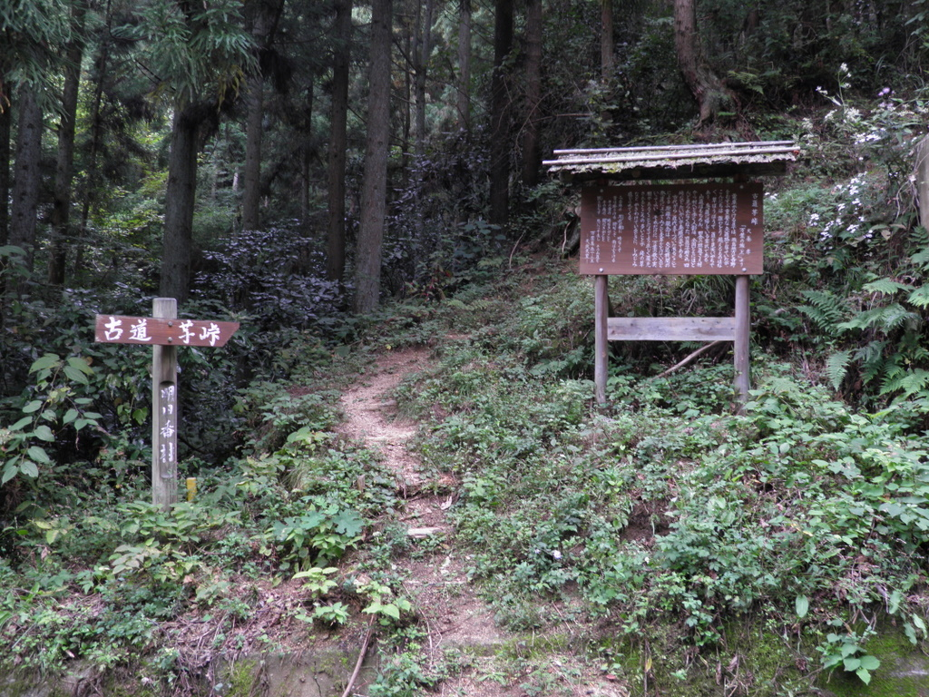 芋ヶ峠（奈良県高市郡高取町）